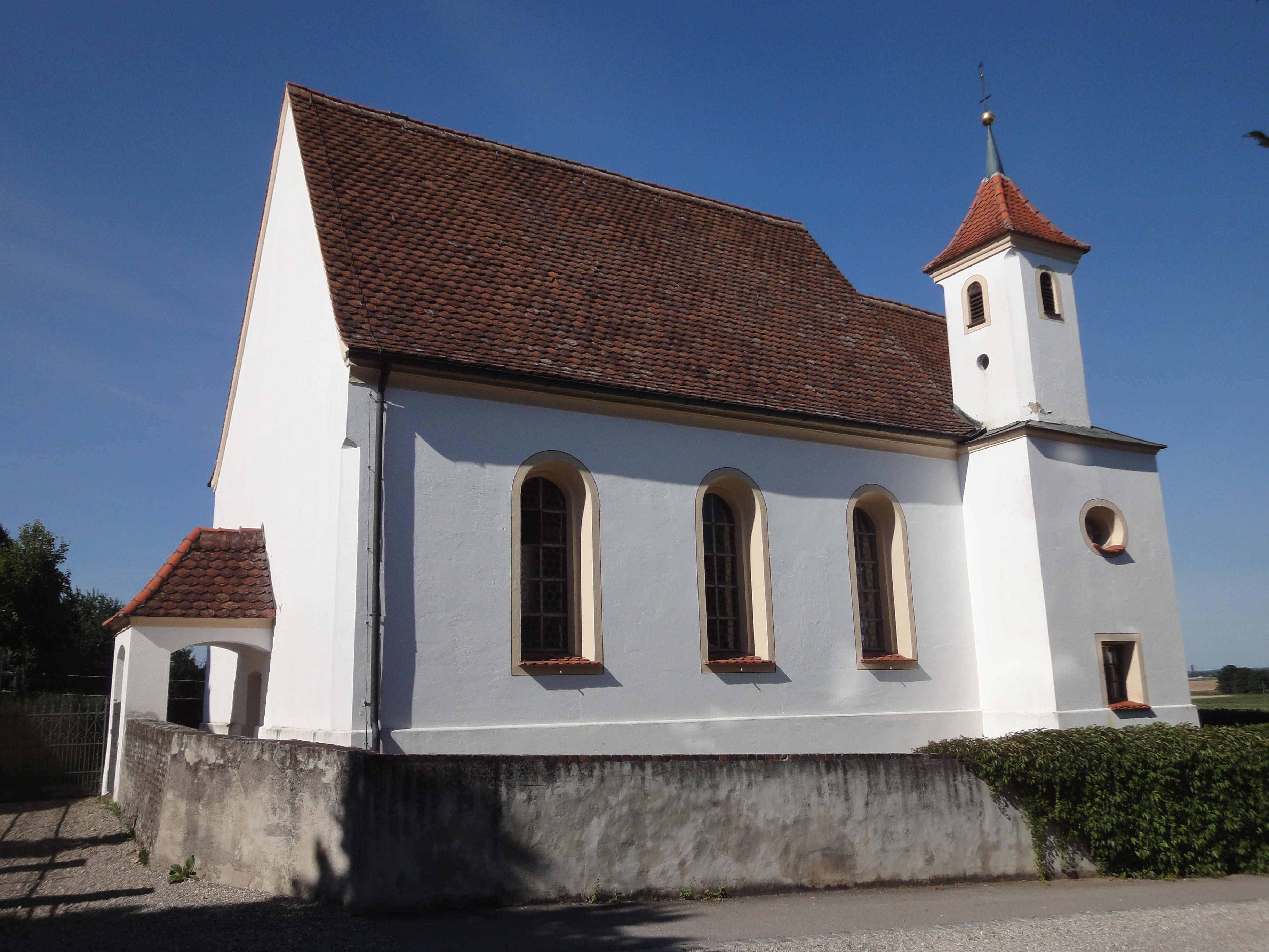 Kapelle zur Schmerzhaften Muttergottes, Saalbau mit eingezogenem Chor und südlichem Turm mit Zeltdach, Chor spätgotisch, 1488, Langhaus von Joseph Meitinger, 1765; mit Ausstattung.